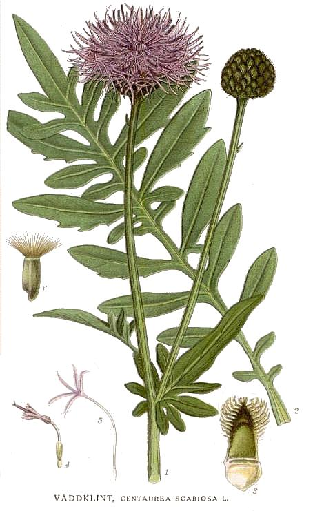 Original Description Väddklint, Centaurea scabiosa L.